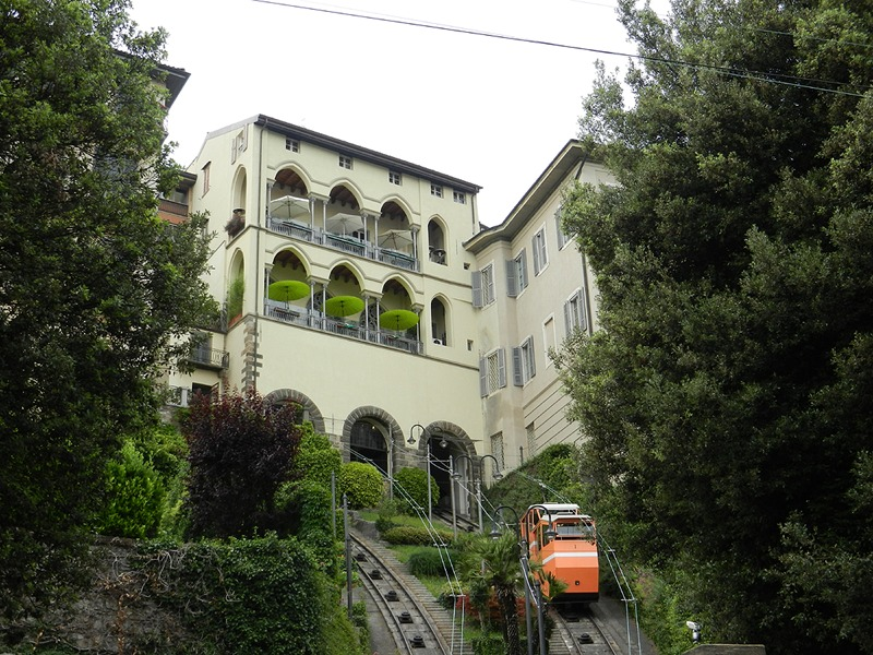 Bergamo - Funicolare per Città Alta